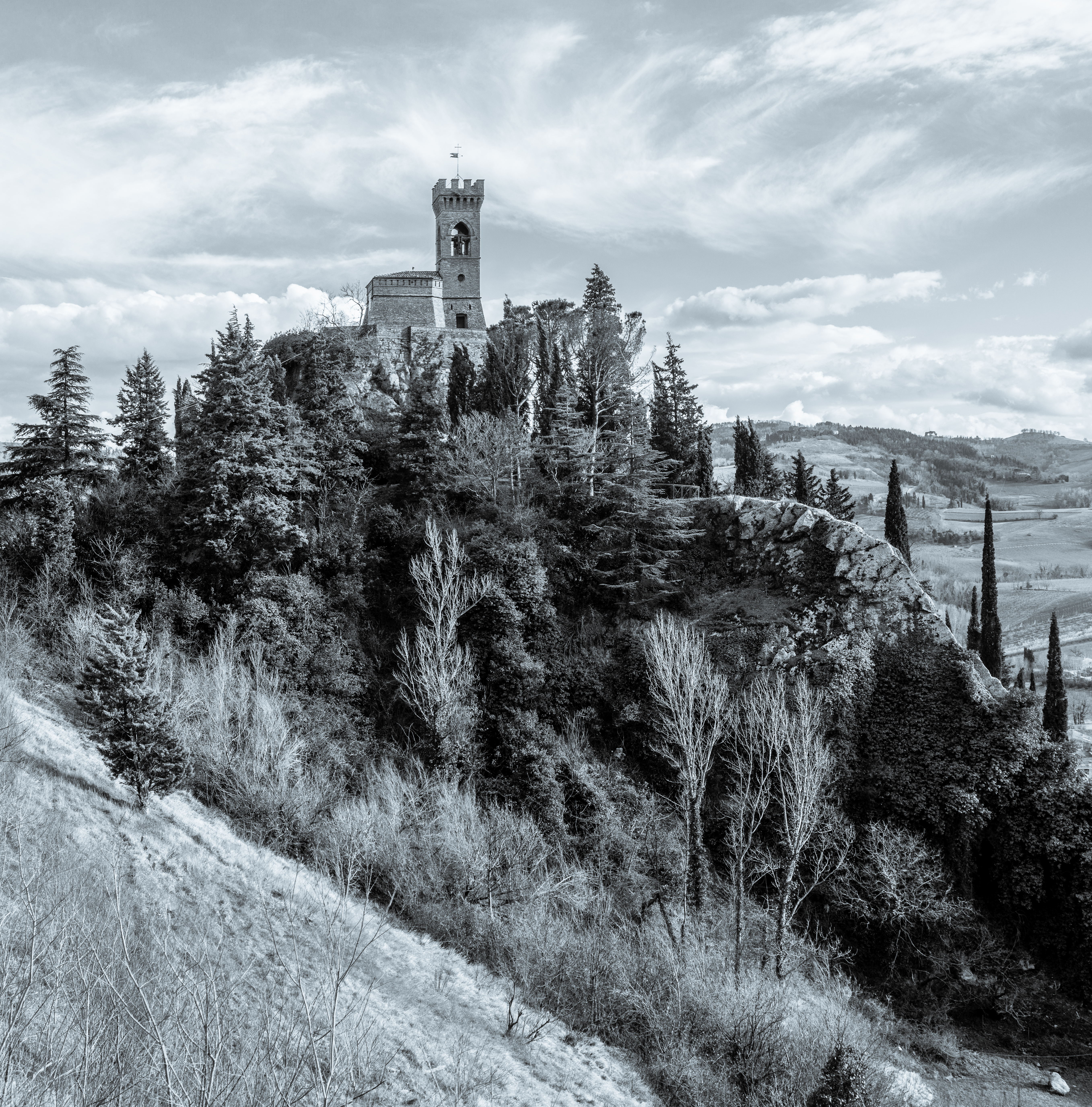 torre dell'Orologio This is a photo of a monument which is part of cultural heritage of Italy.